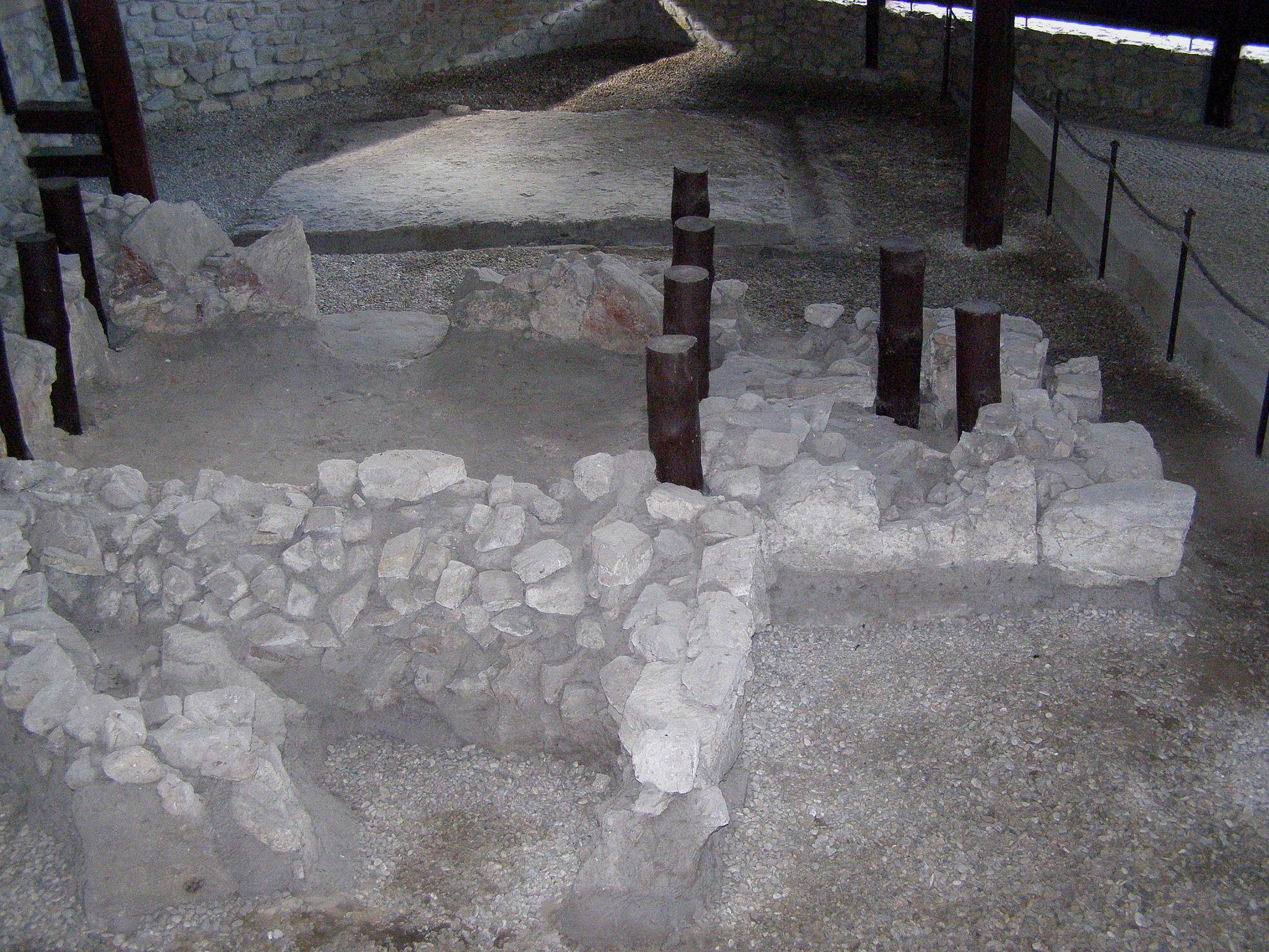 Základy ranokresťanskej kaplnky na Devínskom hrade, zistené archeologickým výskumom v roku 1975